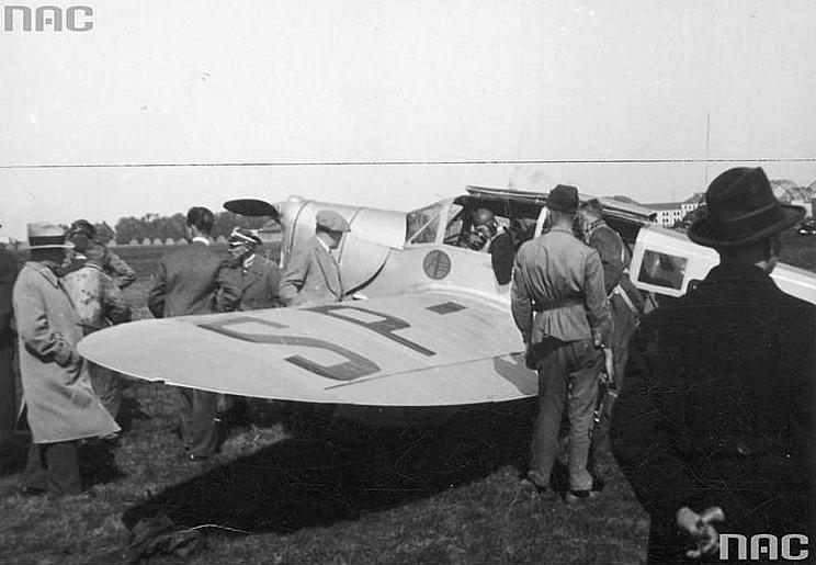 Port lotniczy Warszawa-Okęcie 11 września 1933. Samolot PŻL XIX, na którym kapitan Józef Lewoniewski i pułkownik Czesław Filipowicz wyruszyli w lot na Syberię.